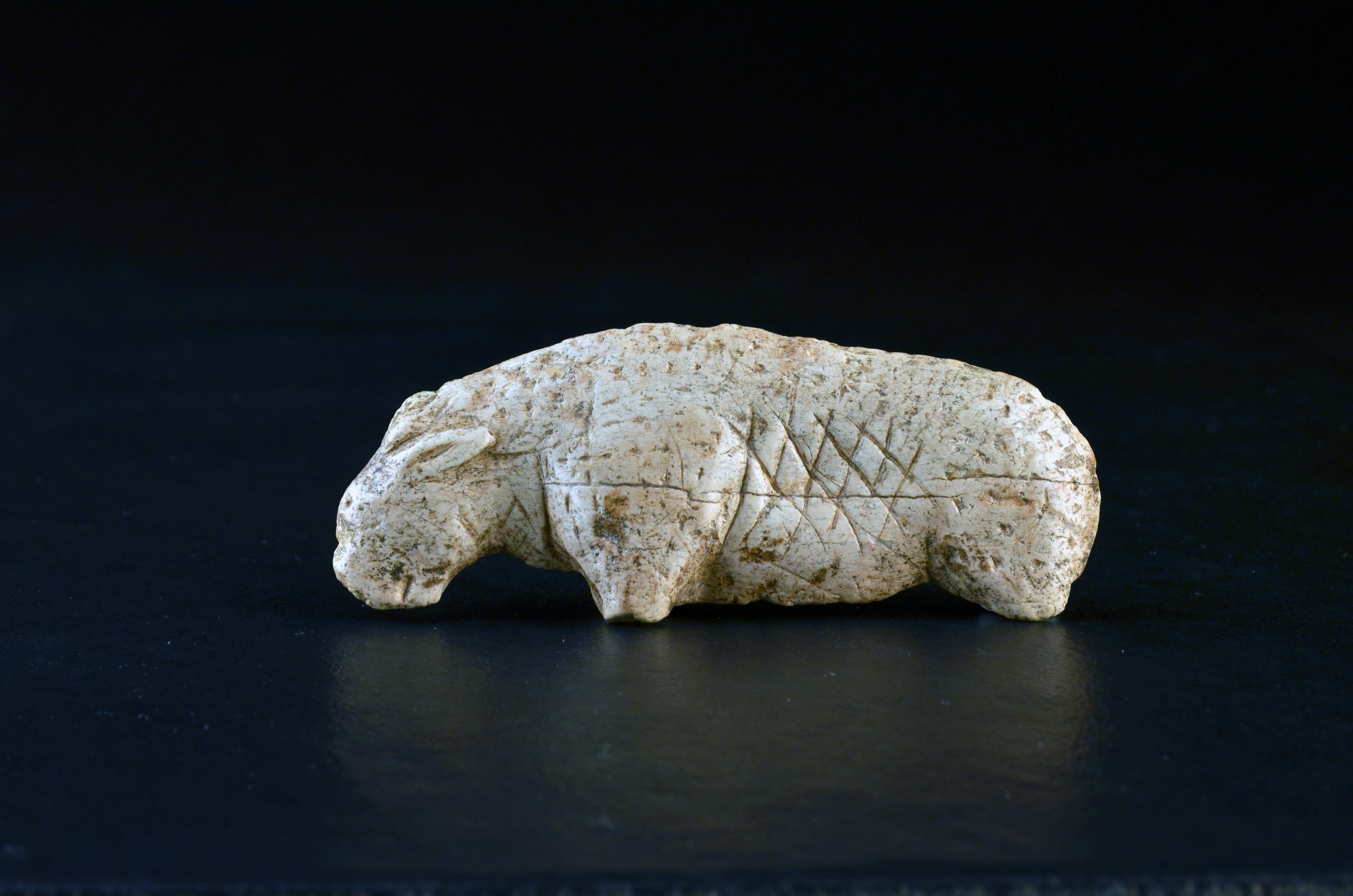 Höhlenlöwe, Tierplastik aus Elfenbein, Vogelherdhöhle Grabung Gustav Riek 1931.